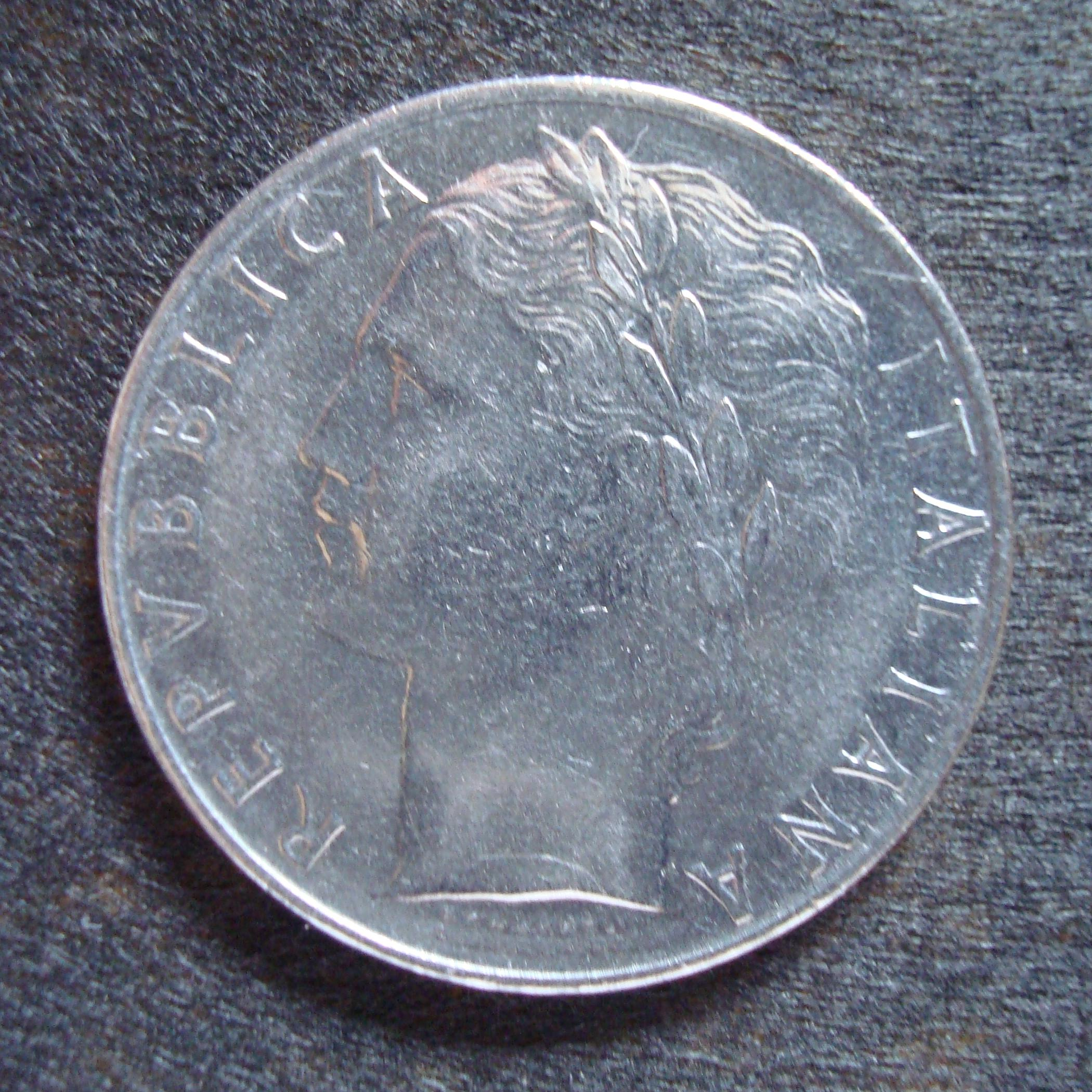 moneta da 100 lire